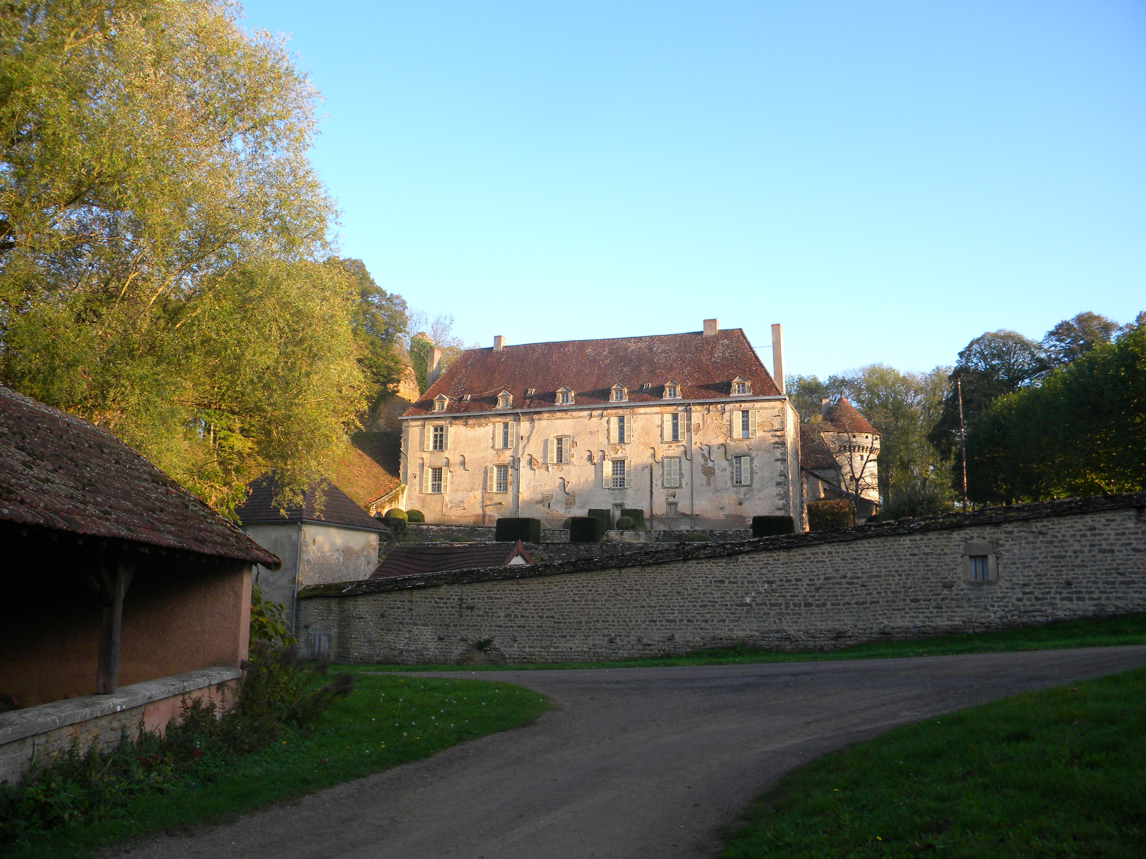 Kastelo de Antigny